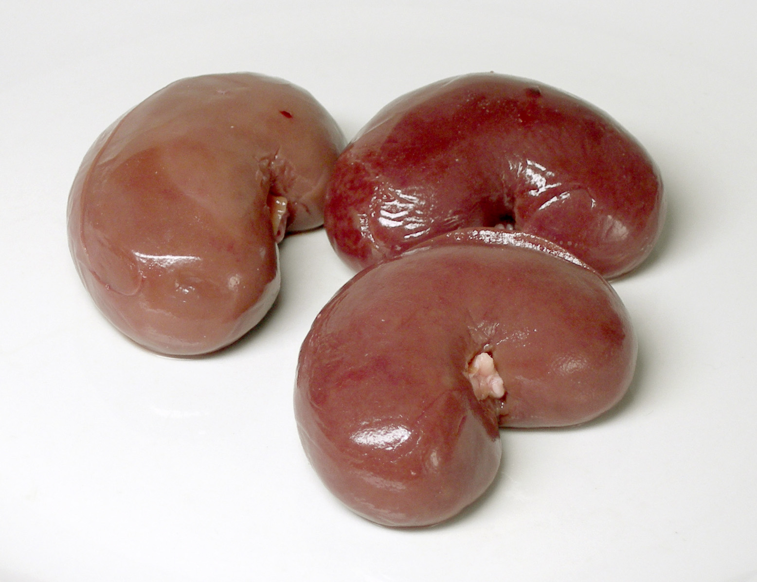 Lamb kidneys